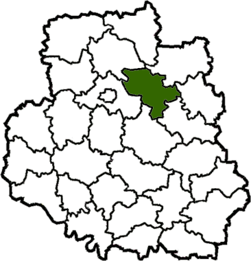 Lypovetskyi-Raion map